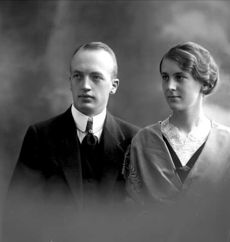 Ragnar Corneliussen og hustru Monna Morgenstierne Roll